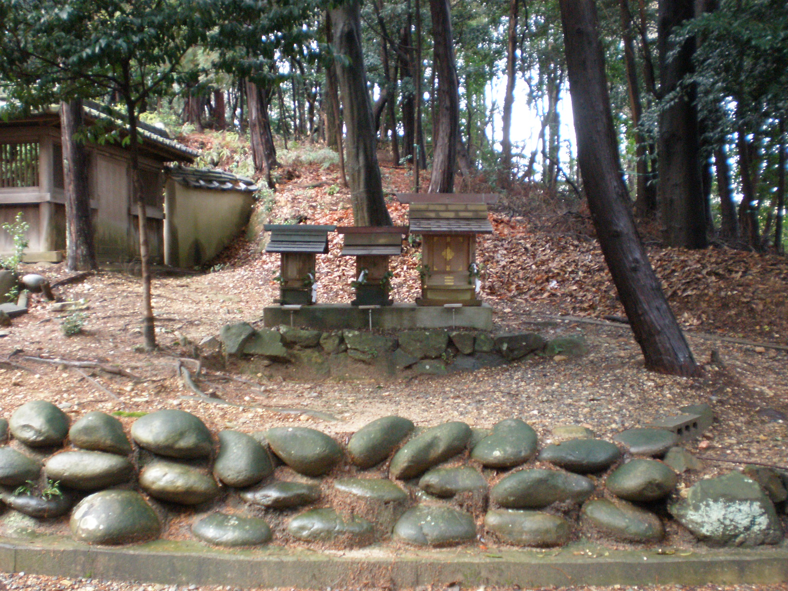 愛知県小牧市の八所神社にある祠